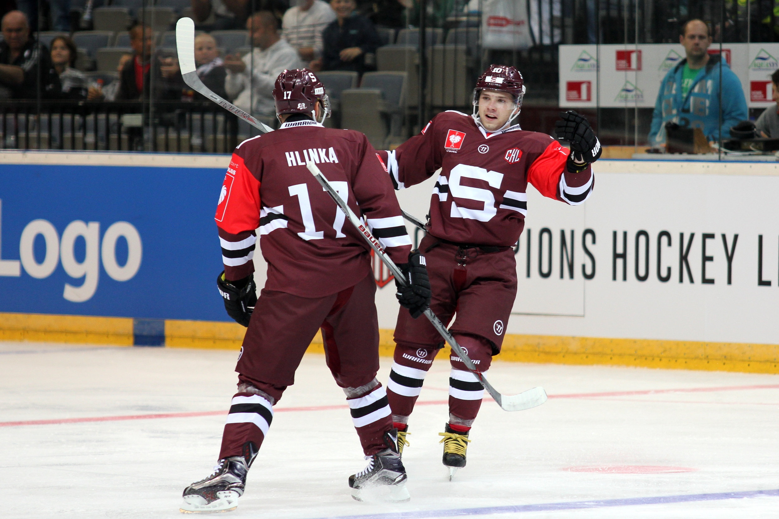 Jaroslav Hlinka (P 17), Martin Réway (P 10).